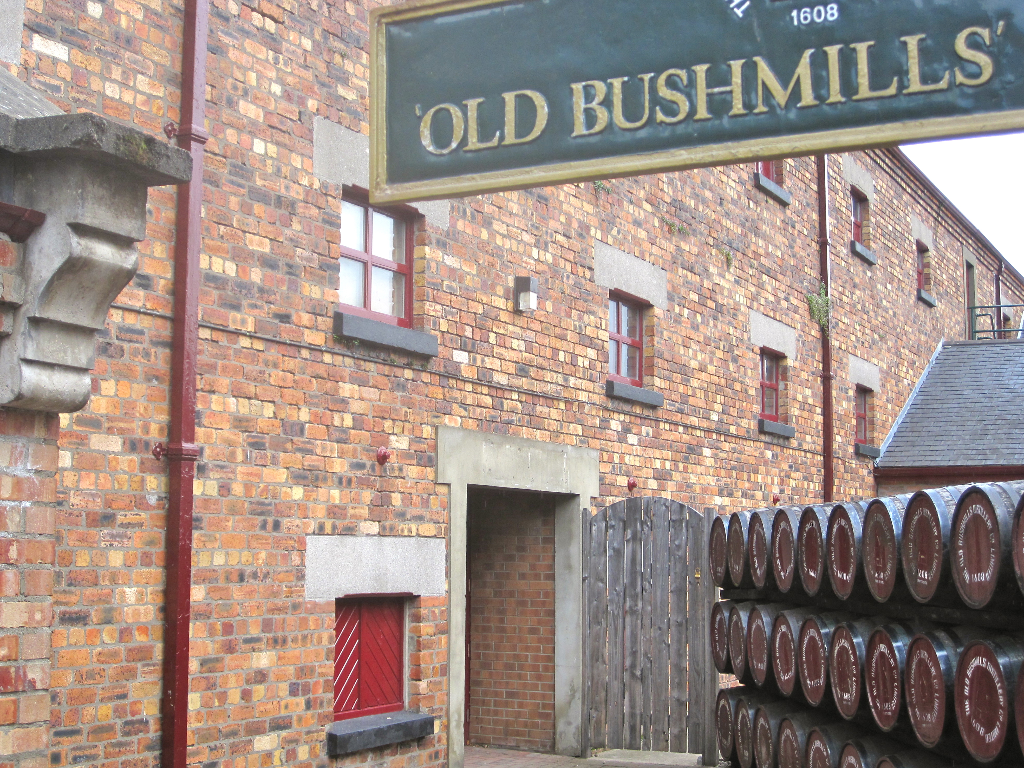 Ausgang der Old Bushmills Tour